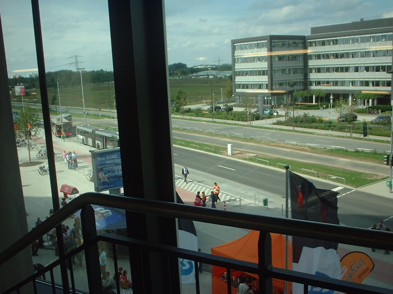 ISS-Dome in Düsseldorf-Rath Eröffnung / Blick zur Theodorstraße